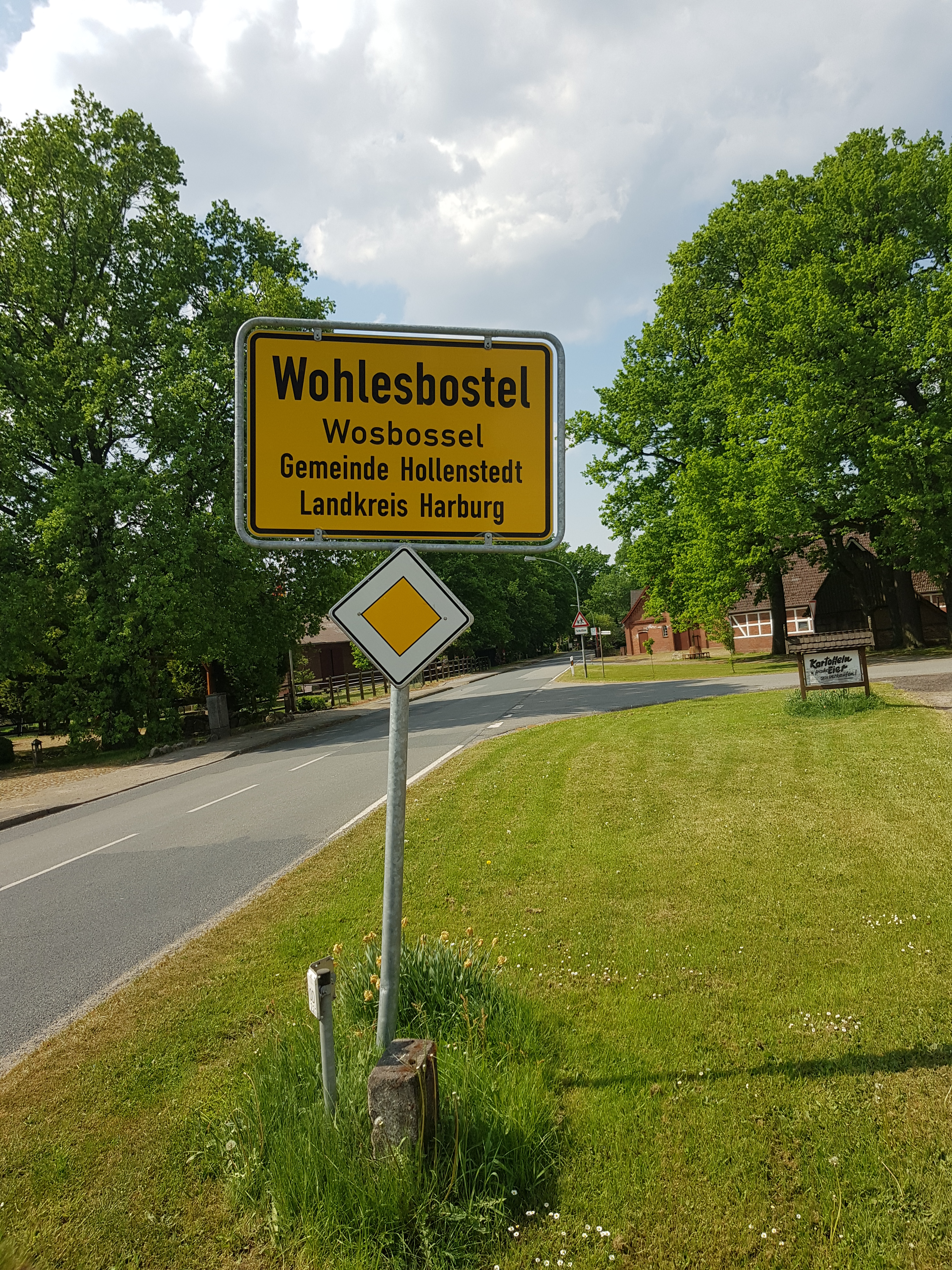 Ortsschild